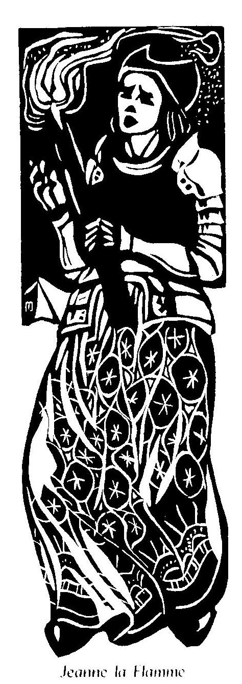 illustration from L'Histoire de Notre Bretagne, 1922